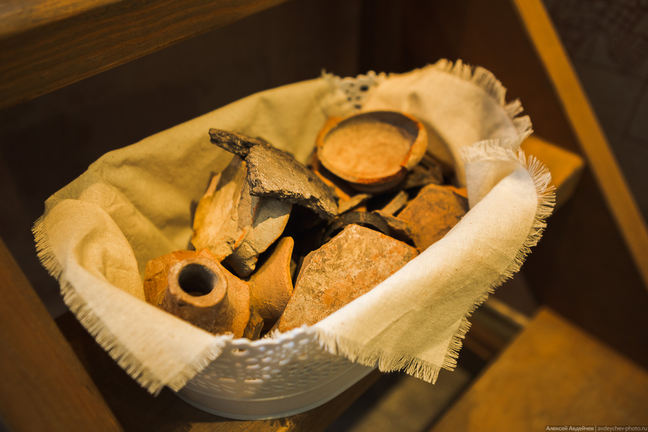 Фрагменты посуды, найденной при раскопках Муромского городка. Экспозиция Жигулевского историко-краеведческого музея "Самарская Лука".